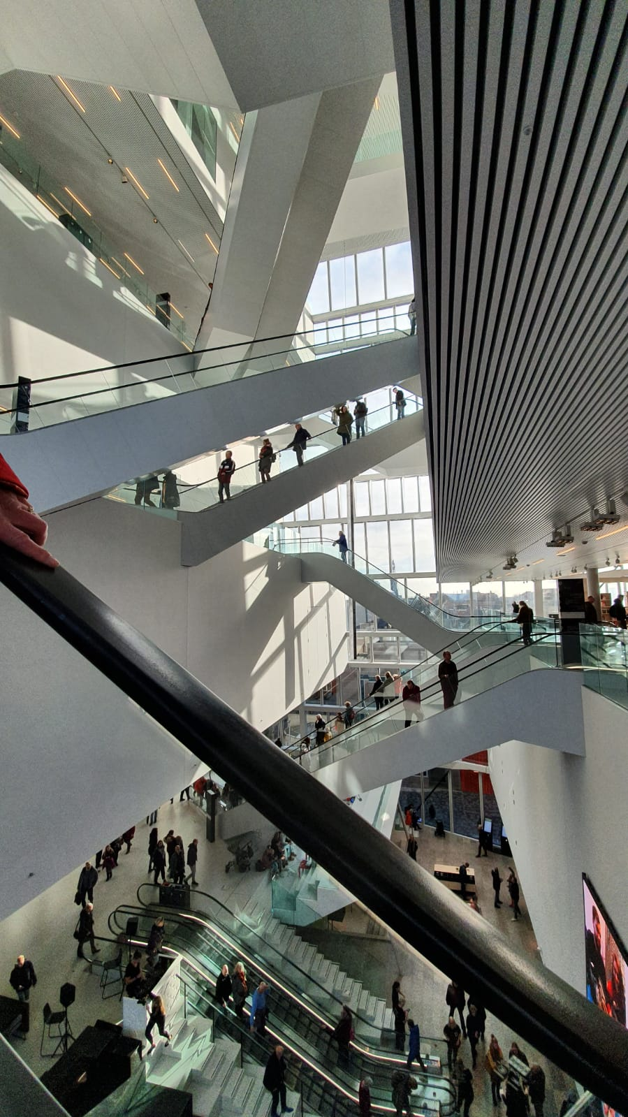 Roltrappen in het Groninger Forum